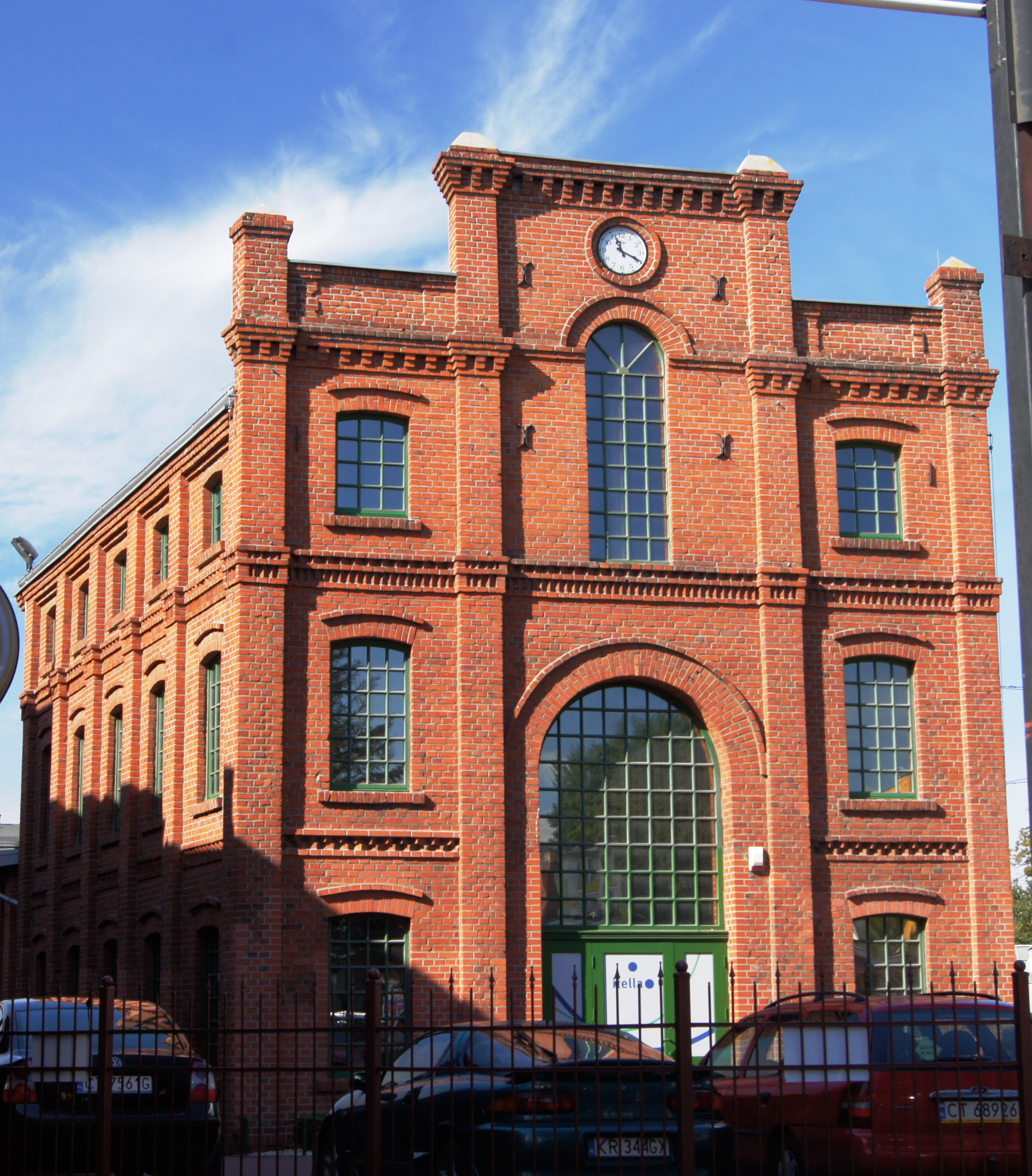 Toruń, ul. Grudziądzka - zespół odlewni żelaza i stali (dawenej fabryki maszyn „Born i Schutze”): hala tokarni, 1898 (zabytek nr A/741/1-6)